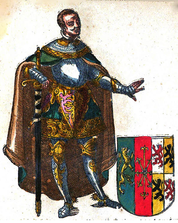 Diederik IX